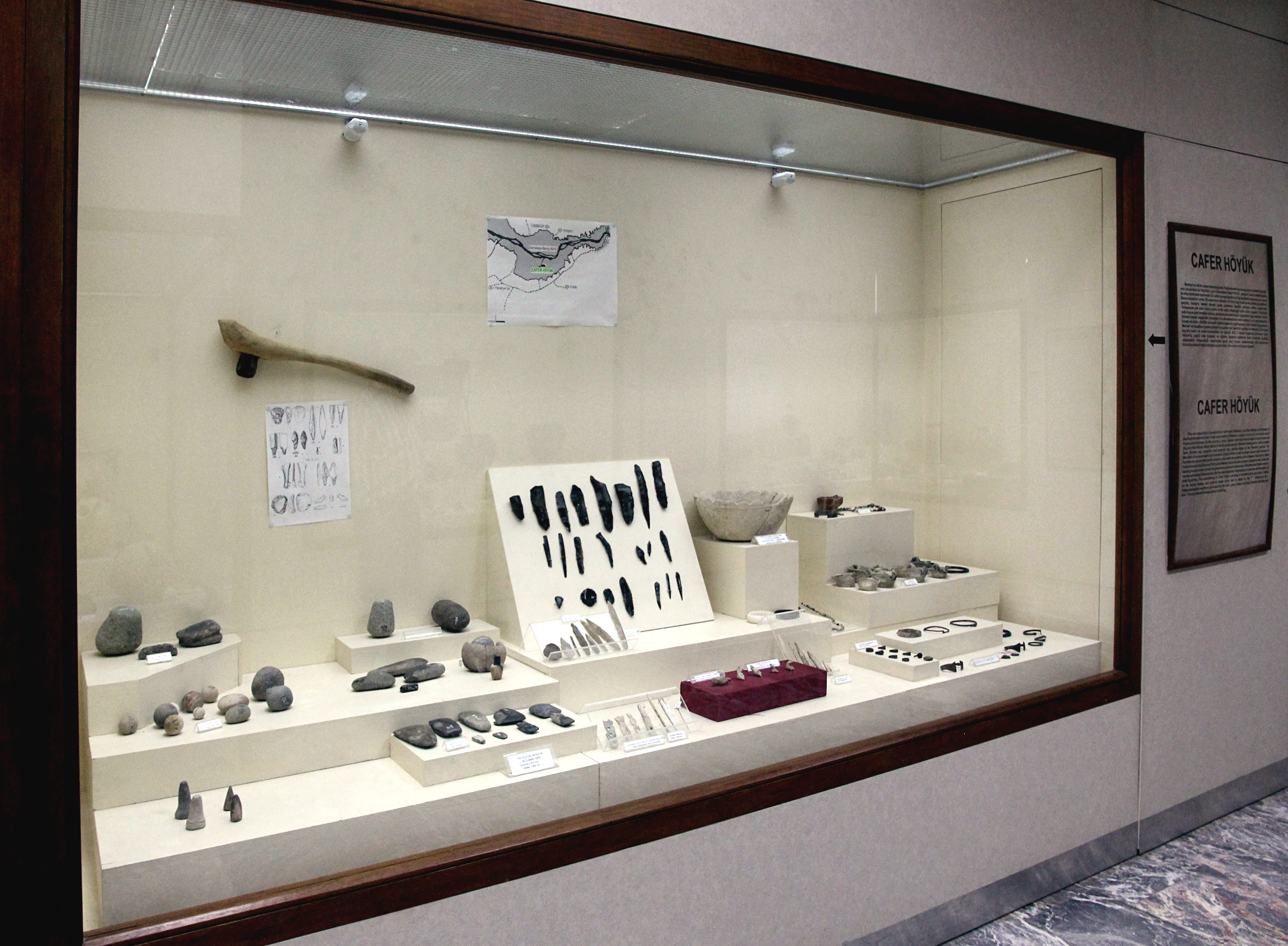 Archäologisches Museum Malatya, Türkei, Funde aus Cafer Höyük